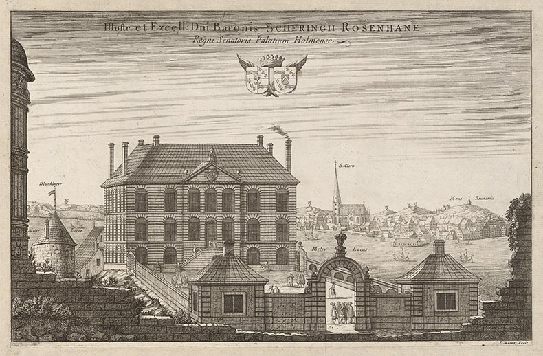 Titel i svensk övers. : Den lysande och utmärkte herr baronen och riksrådet Schering Rosenhanes palats i Stockholm